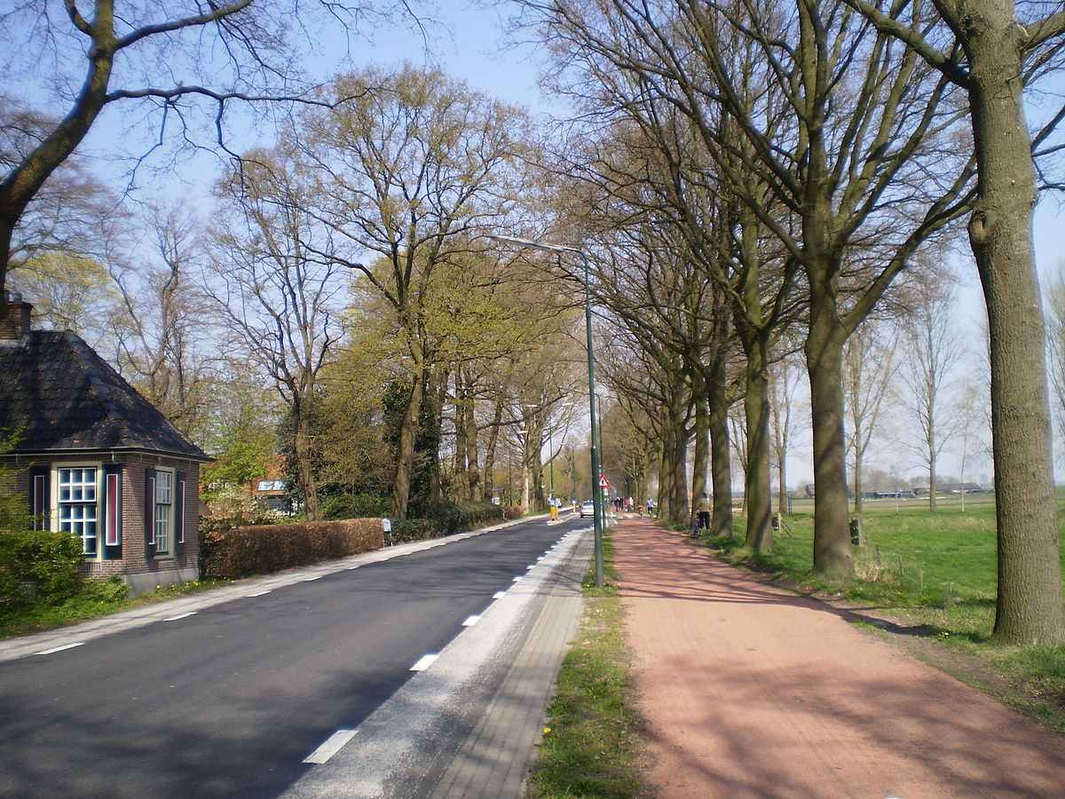 In noordelijke richting, ter hoogte van het tolhuis